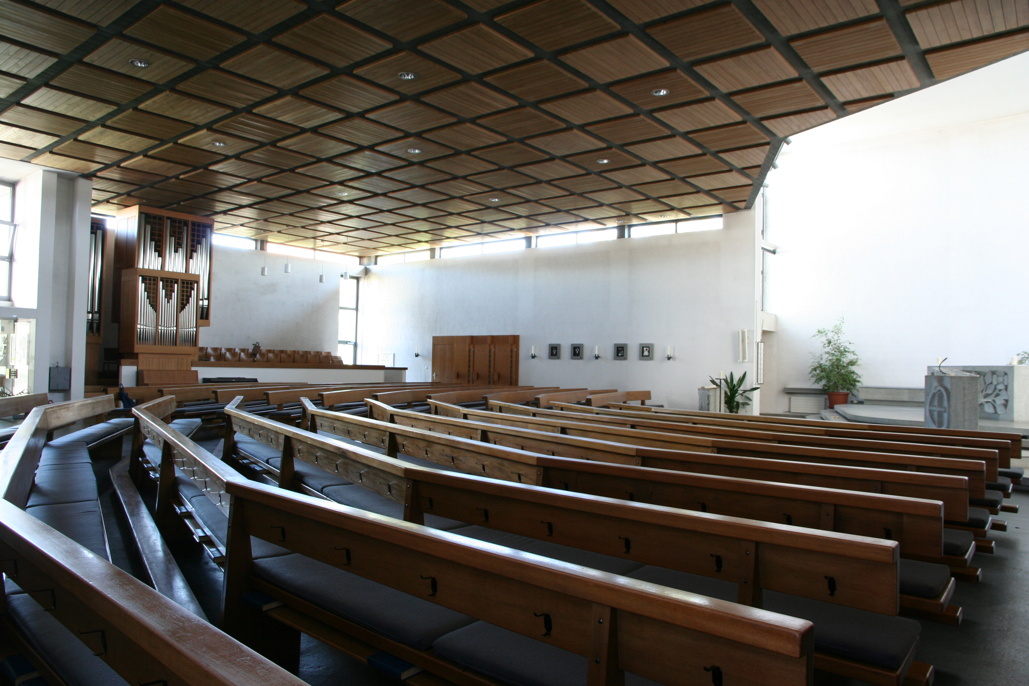 röm.-kath. Pfarrkirche Eschlikon TG